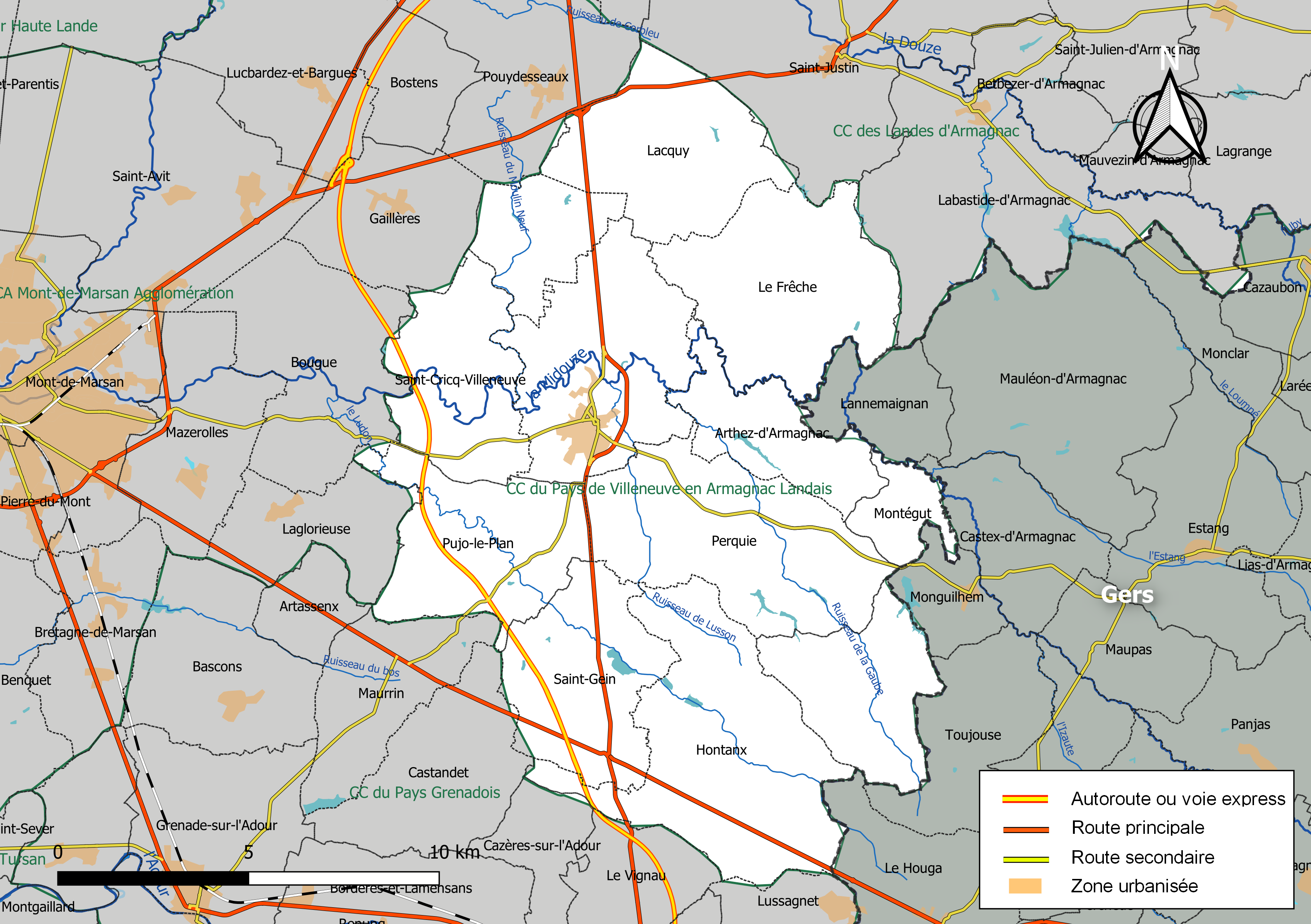 Carte géographique de la Communauté de communes du Pays de Villeneuve en Armagnac Landais, département des Landes, France. Composition au 1er janvier 2019.